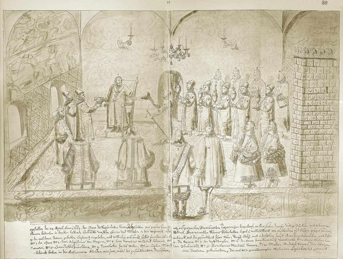 Прием посланников римского императора Леопольда I русским царем Алексеем Михайловичем. 24 апреля 1662 г. Рисунок из Альбома Мейерберга